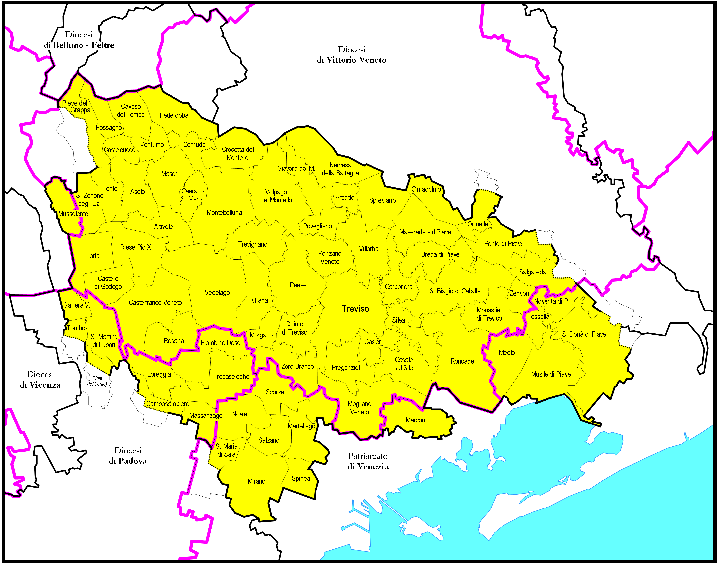 Mappa Diocesi di Treviso